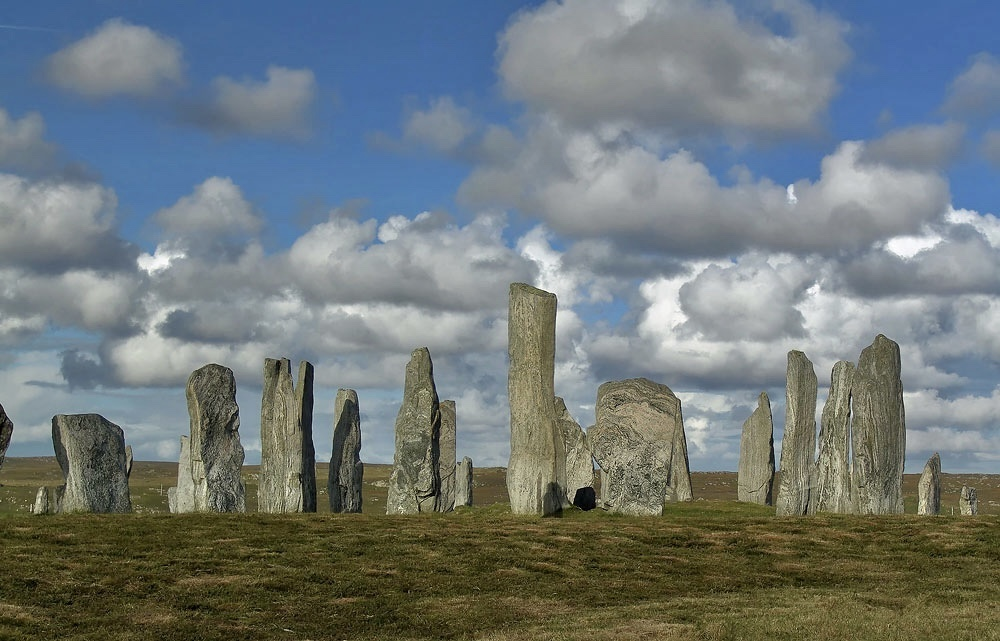 Bauwerke der Megalithkultur – Steinkreis von Callanish, Isle of Lewis, Schottland.